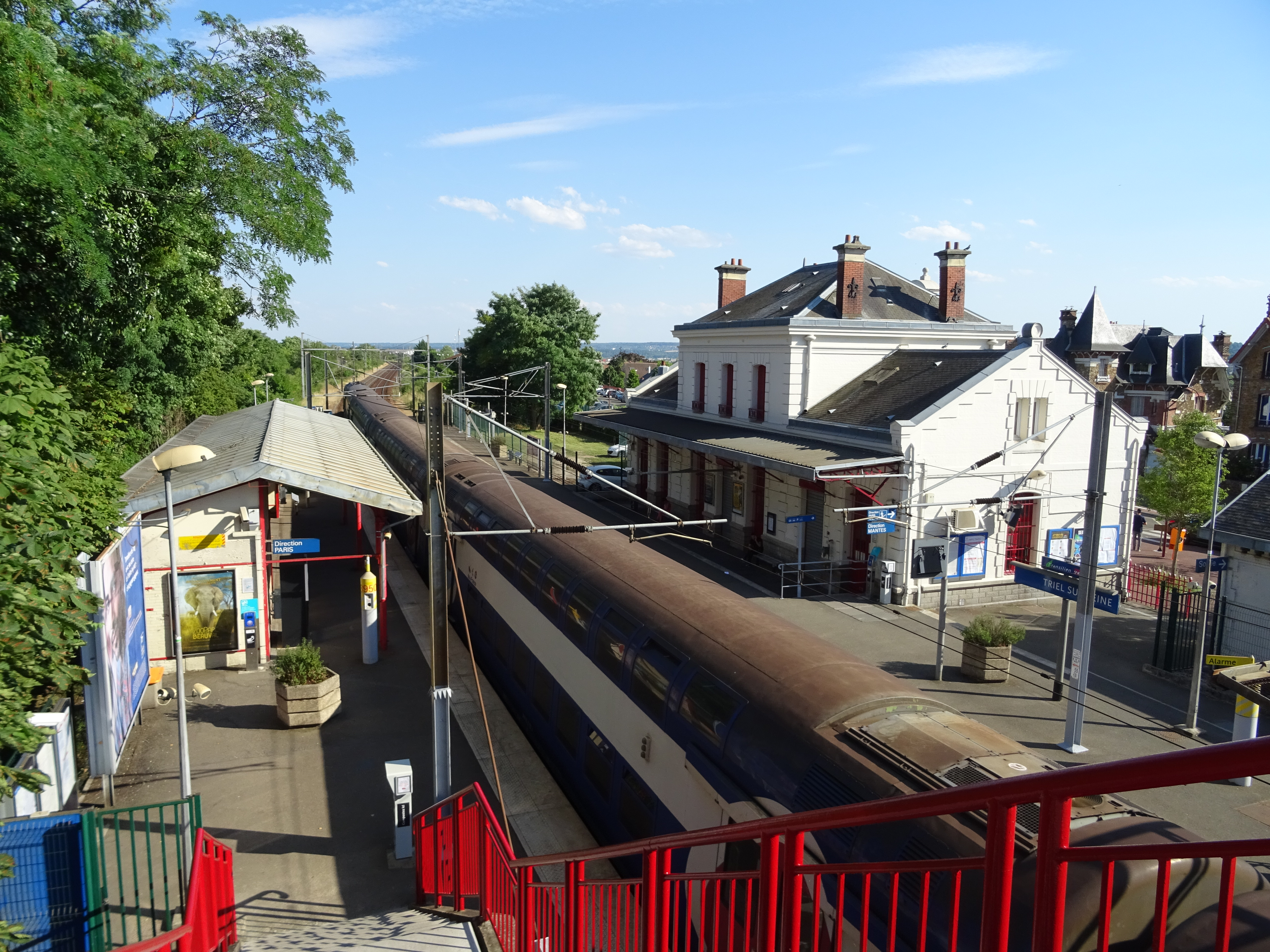 Gare avec une VB2N au départ en direction de Paris en gare de Triel.